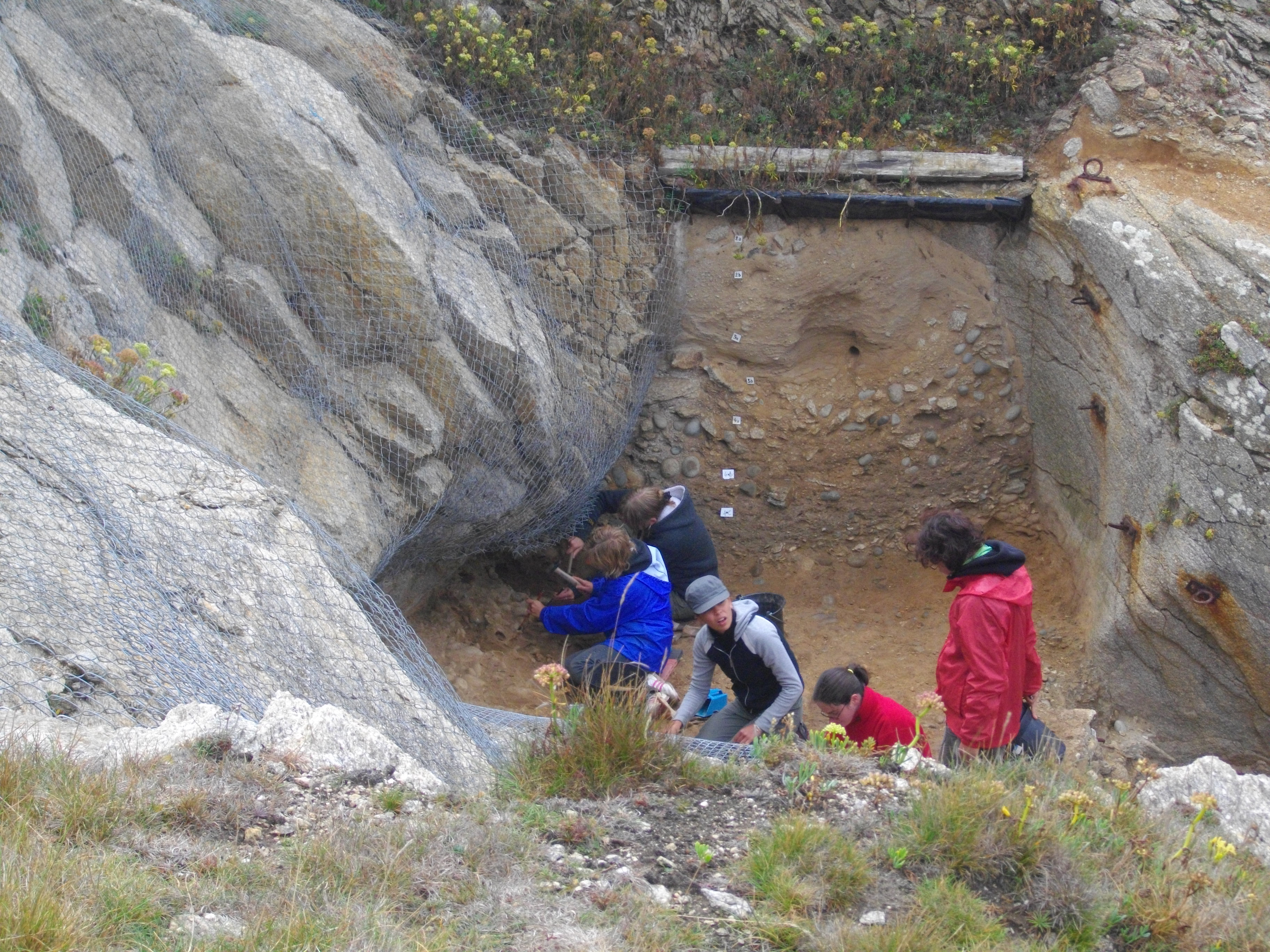 Gisement de Menez-Dregan. Fouilles en cours